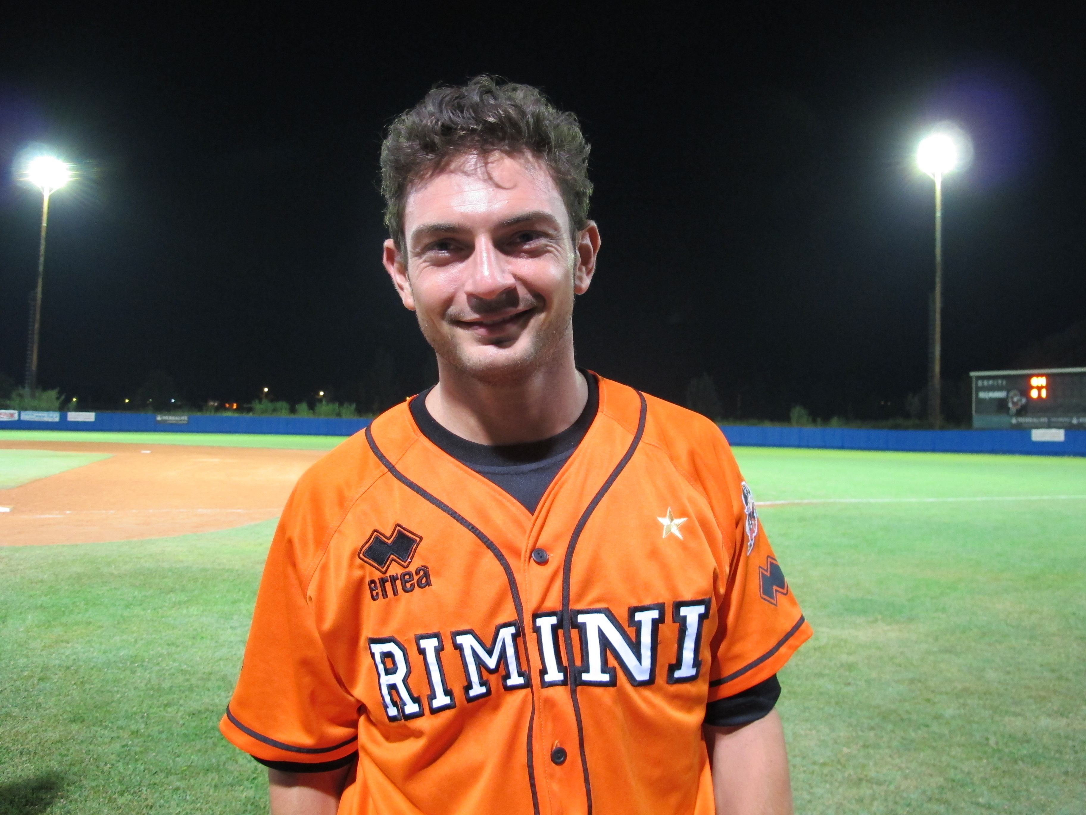 Mario Chiarini della Telemarket Rimini Baseball al termine di gara 4 della serie scudetto 2012, disputata contro la T&A San Marino.